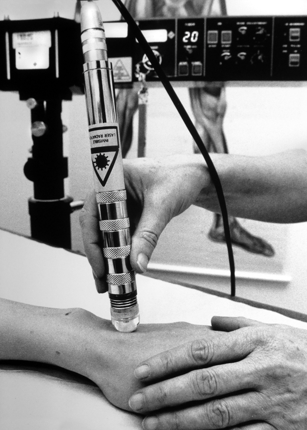 Medicinsk Laser för behandling av reumatism.